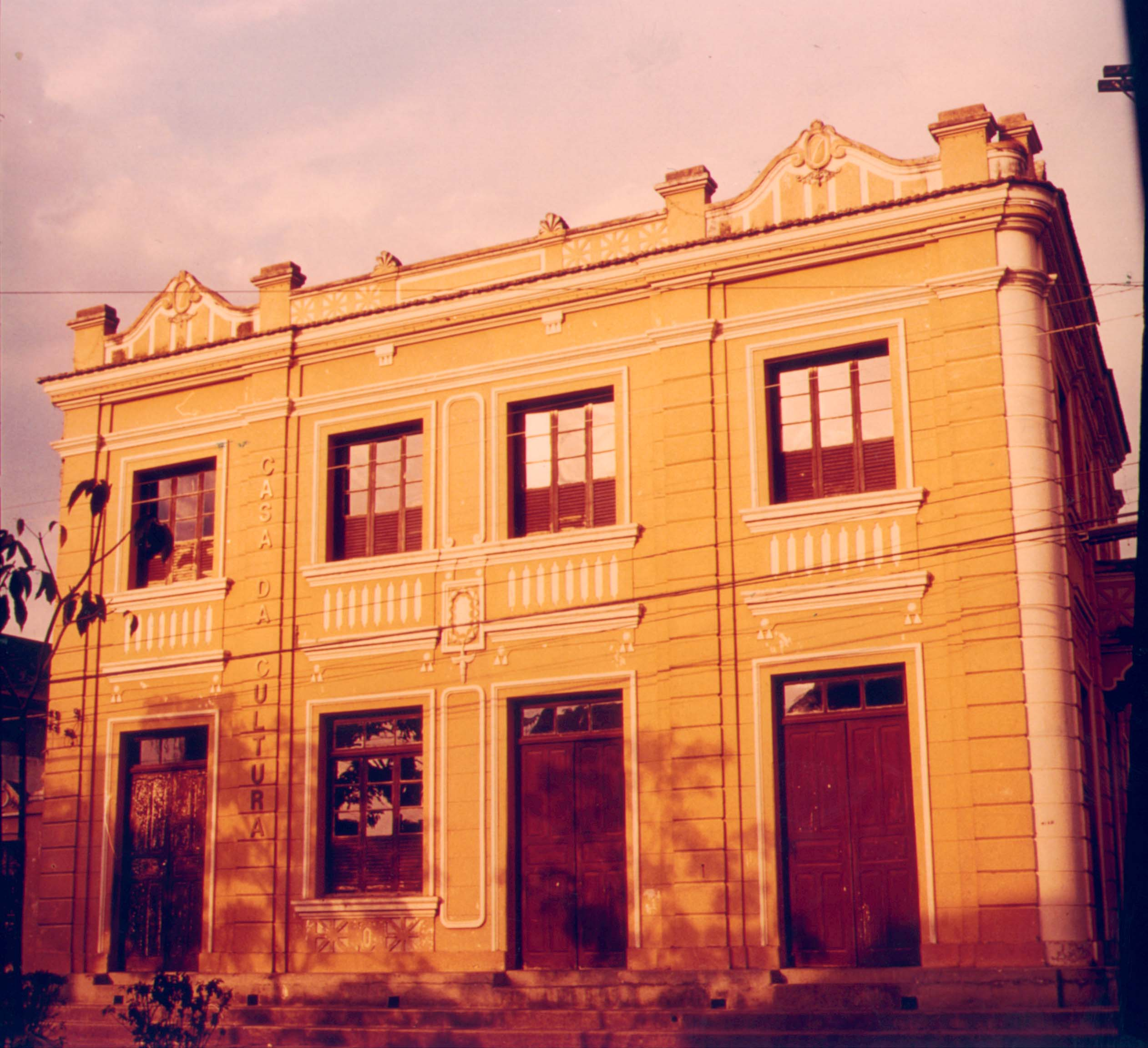 Casa da cultura de Vespasiano, construída na década de 1920